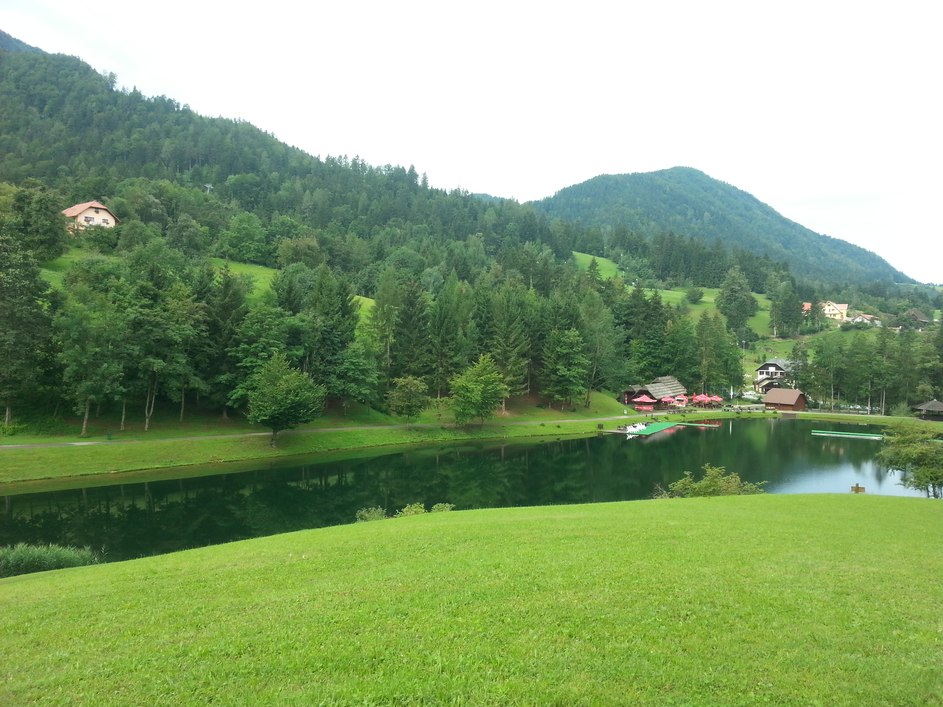 Ivarčko jezero